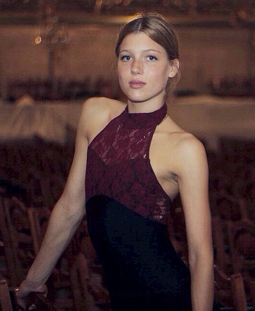 KEENAN KAMPA, Mariinsky Ballet